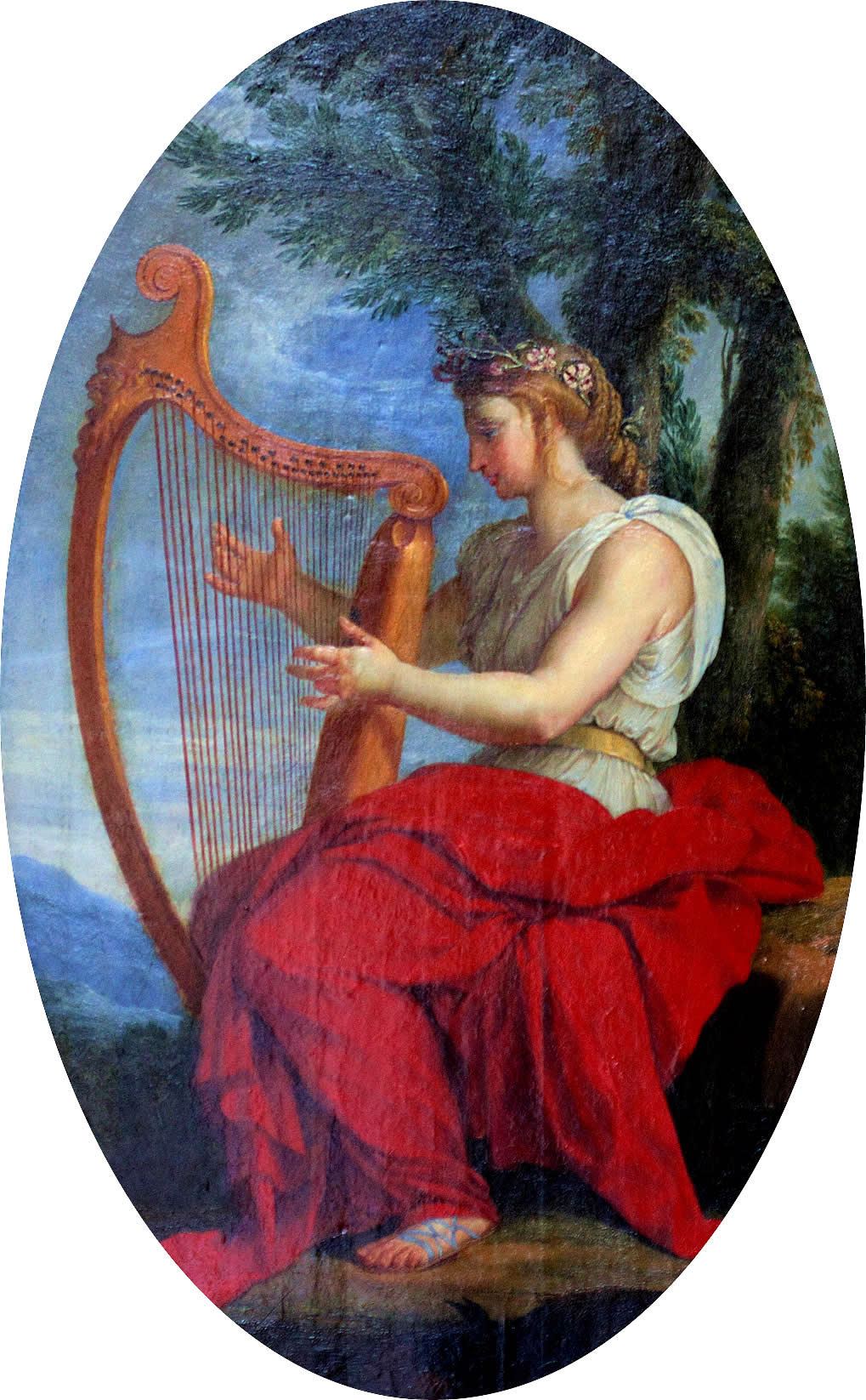 21 × 34 cm